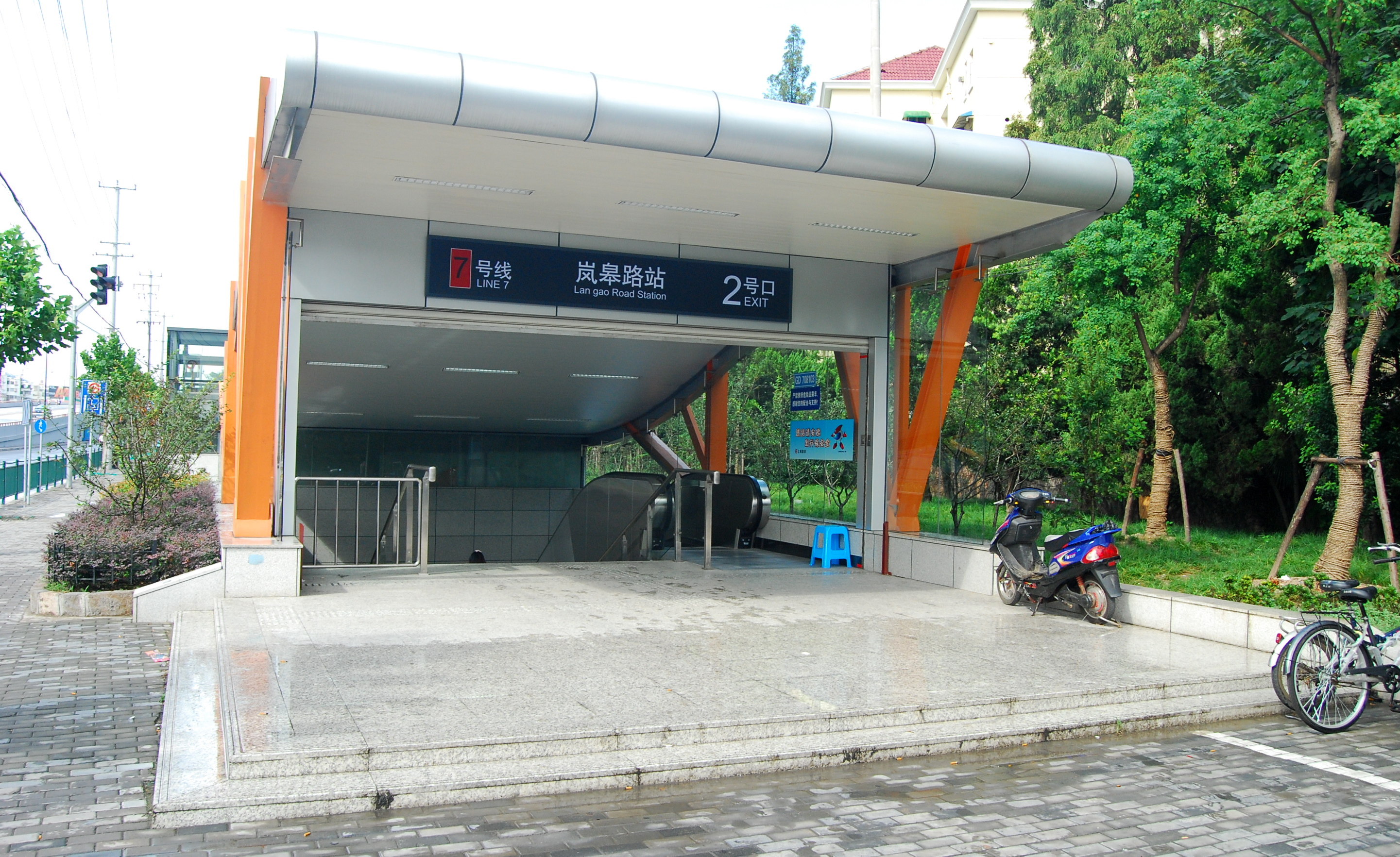 上海地铁岚皋路站2号出口